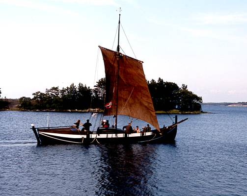 Viikinkivene, Kustavissa, Katanpäässä.